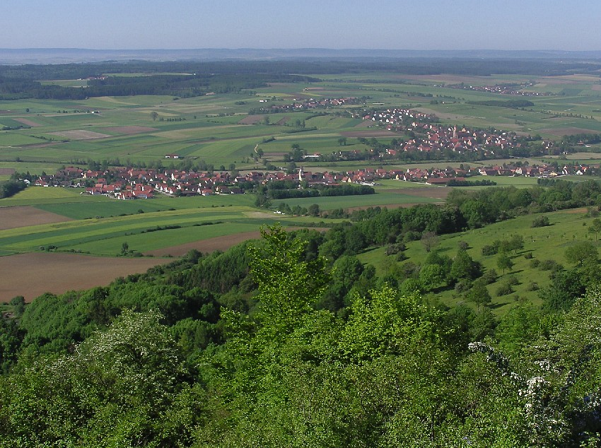 Gerolfingen and Aufkirchen from Hesselberg, Bayern, Germany